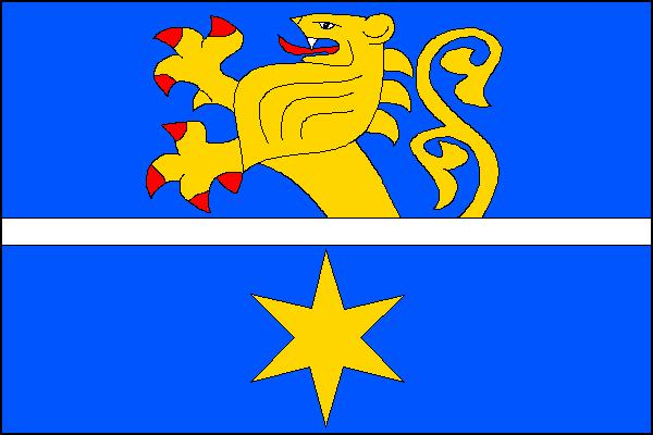 Vlajka obce Hvězdonice